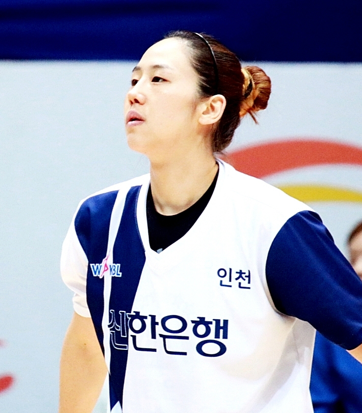 160217 여자농구 신한은행 vs KB스타즈 직찍 2